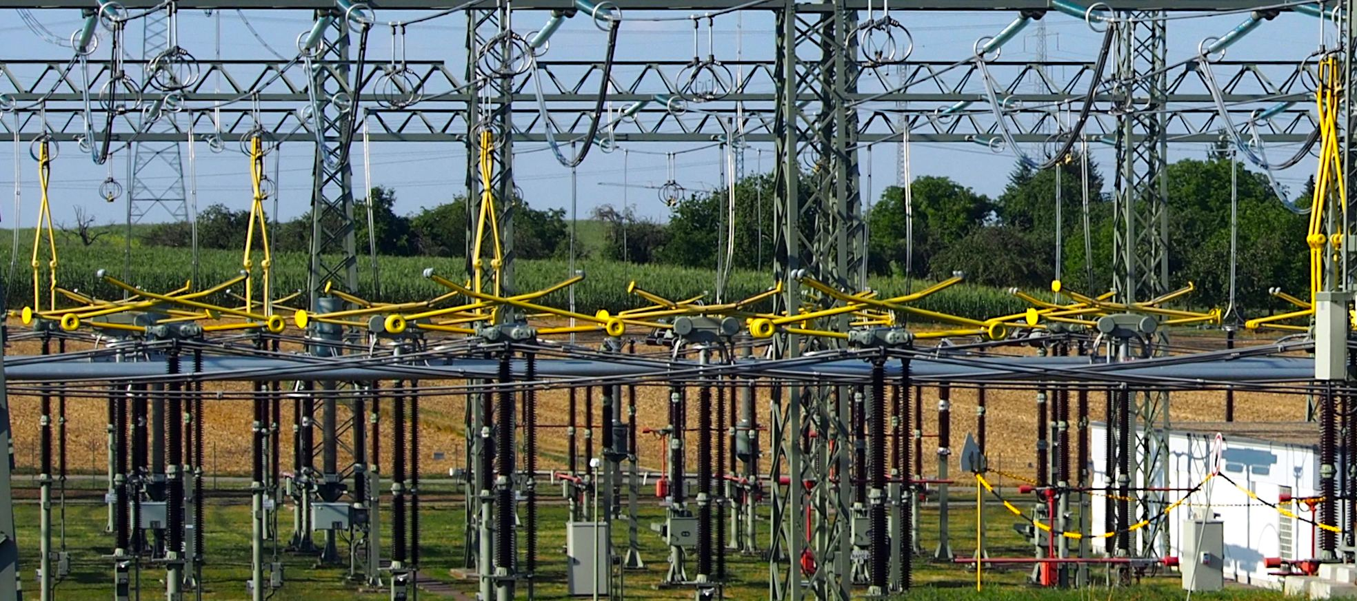 Gelbe Trennschalter im Umspannwerk Hoheneck, vmtl. 220kV